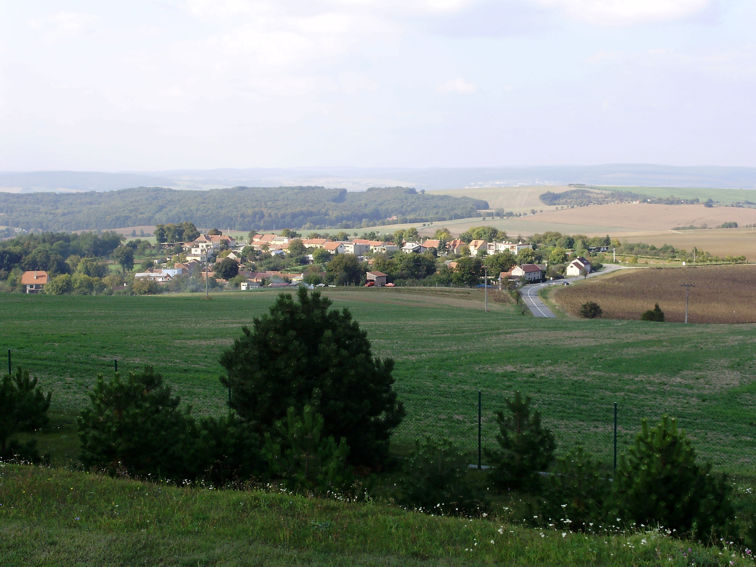 celkový pohled na Manerov z Holého kopce (Vyškov- Czech republic)